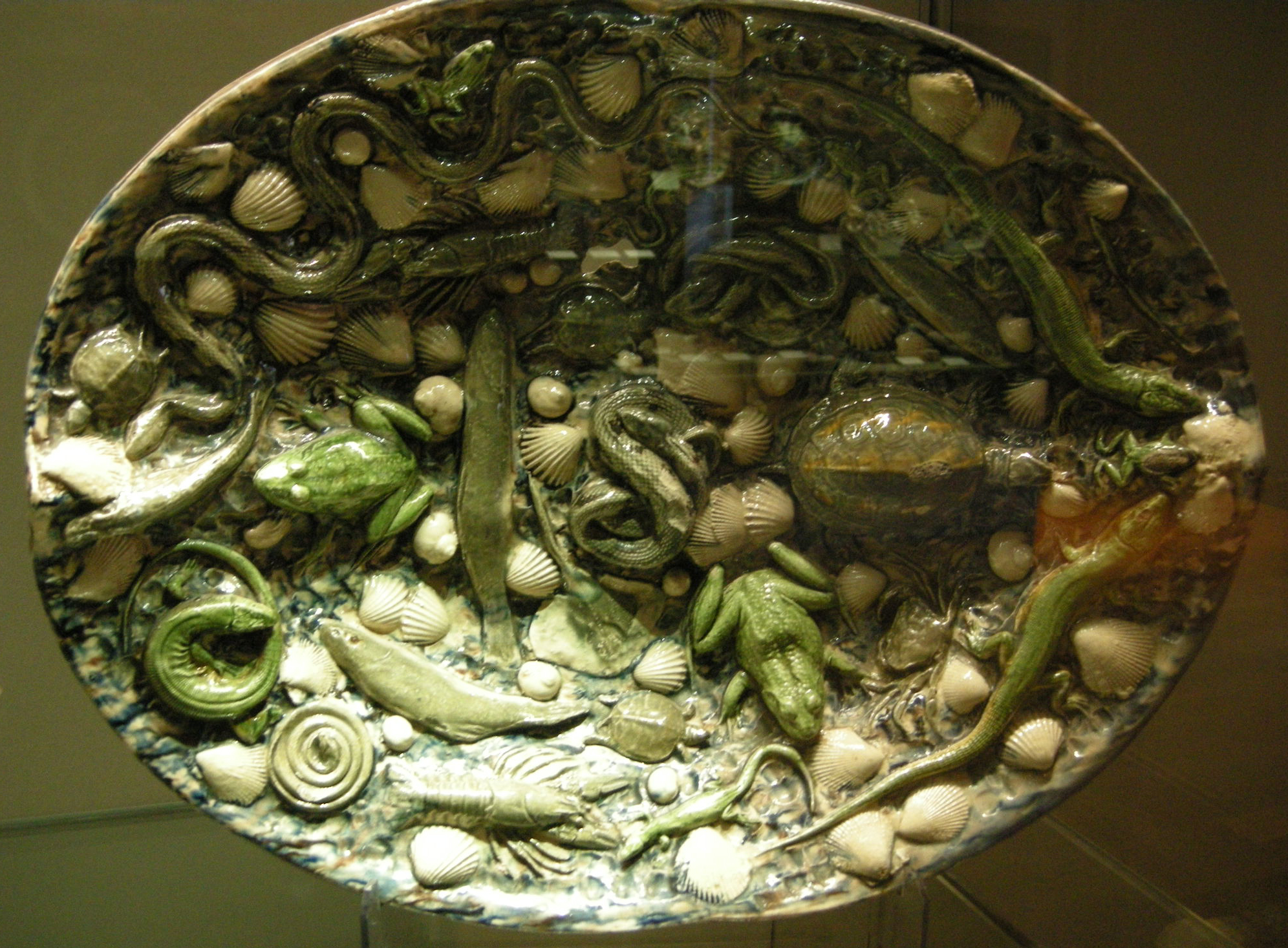 Vassoio rustico attribuito a bernard palissy 03.JPG